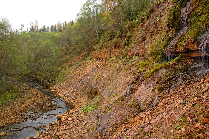 Каньон реки Рагуша